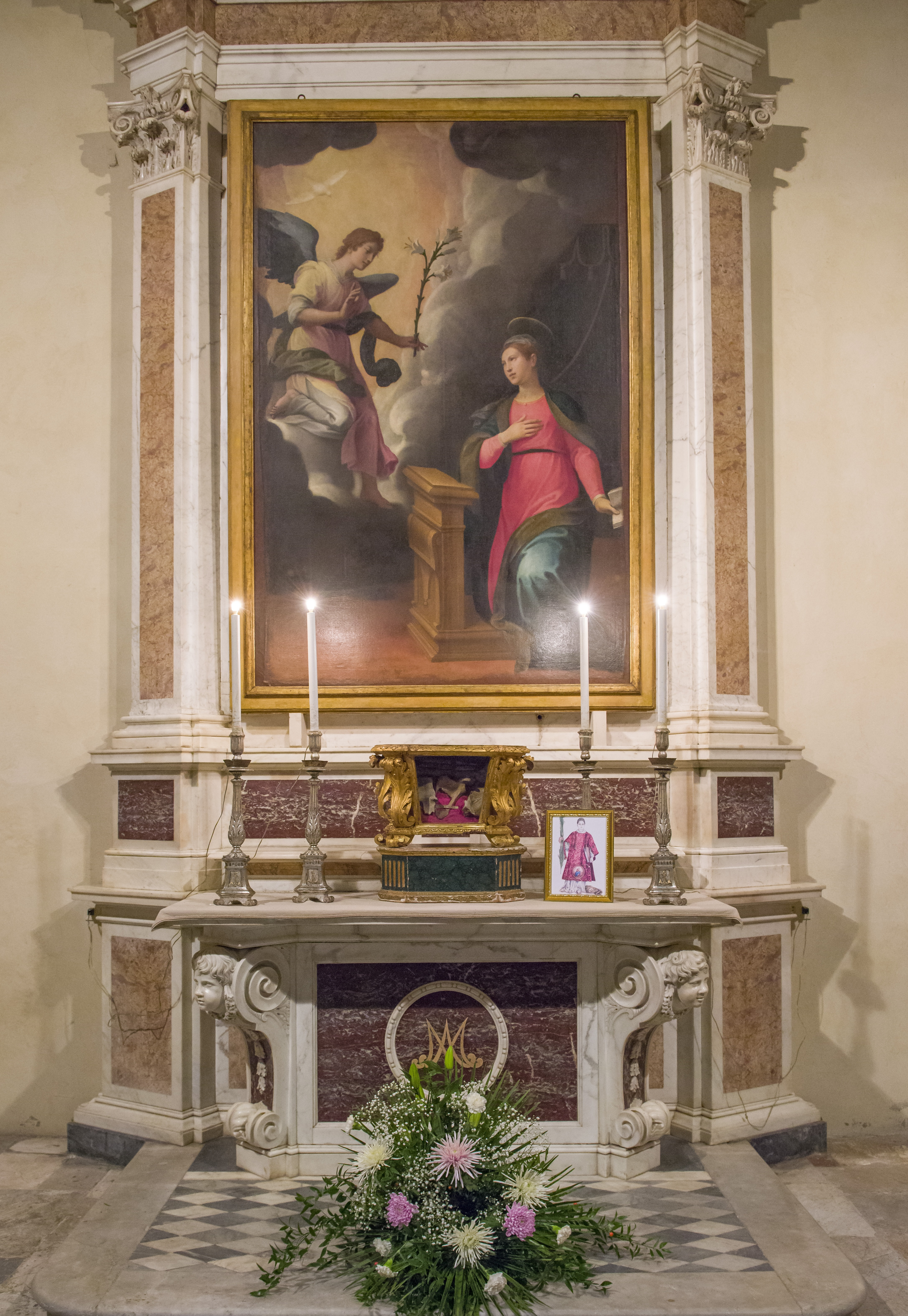 Lucca, Basilica di San Frediano: esposizione della nuova icona di San Cesario accanto al reliquiario contenente sei ossa del diacono, Cappella dell'Annunziata (foto Lucio Ghilardi)